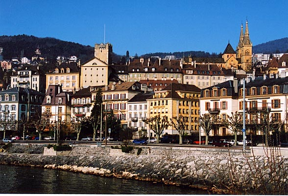 Neuchâtel mit Tour du Prison und Kathedrale (2001)